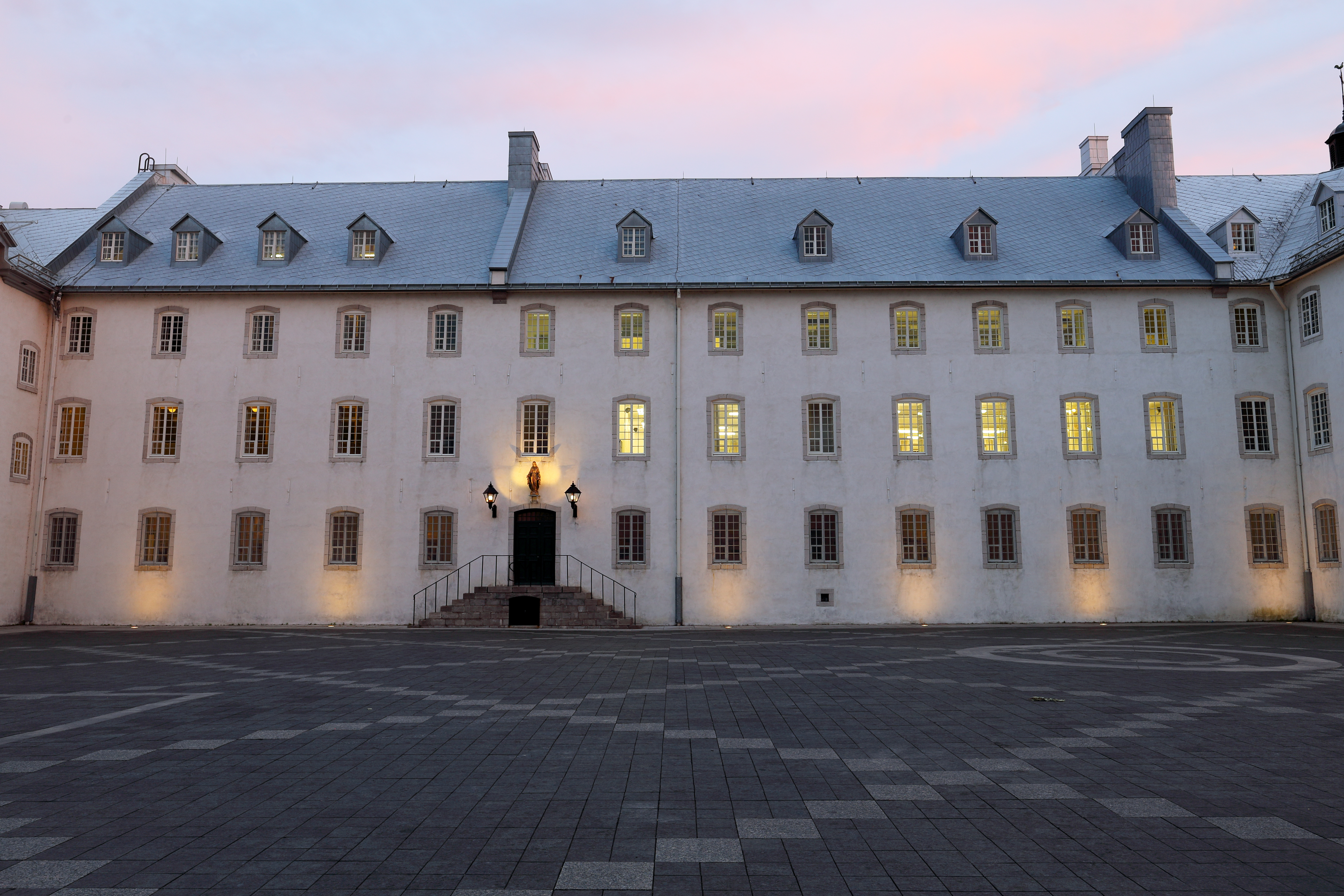 École d'architecture de l'Université Laval, Séminaire de Québec.